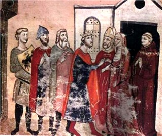 1186 mariage de Constance de Hauteville avec henri VI de Souabe